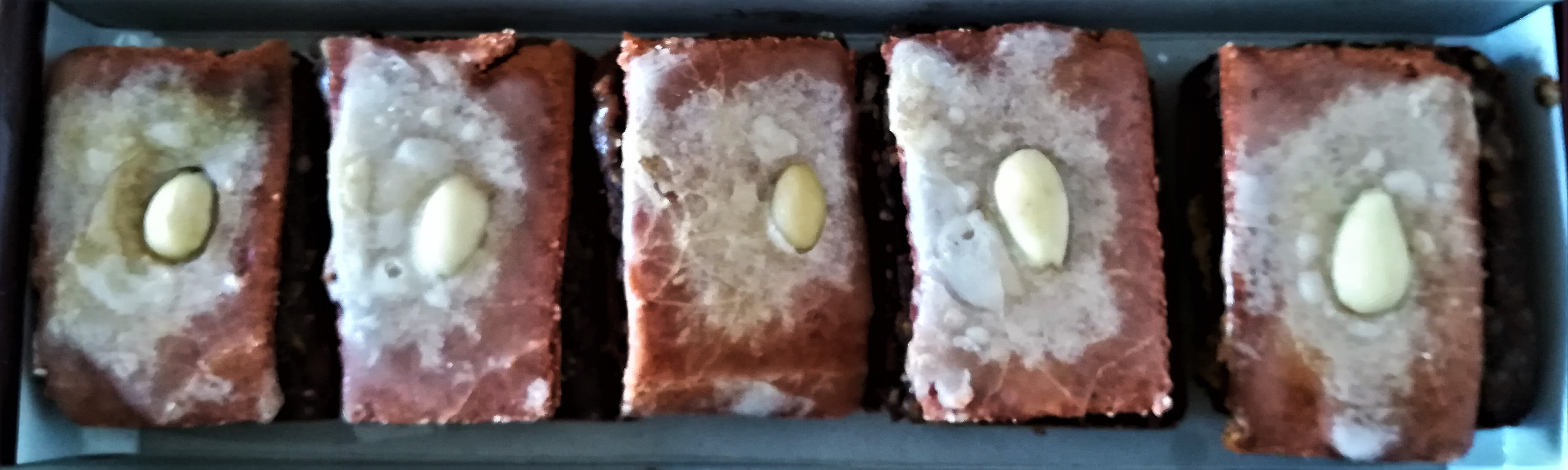 Miletínská modlitbička - specjalność cukiernicza z czeskiego Miletina.